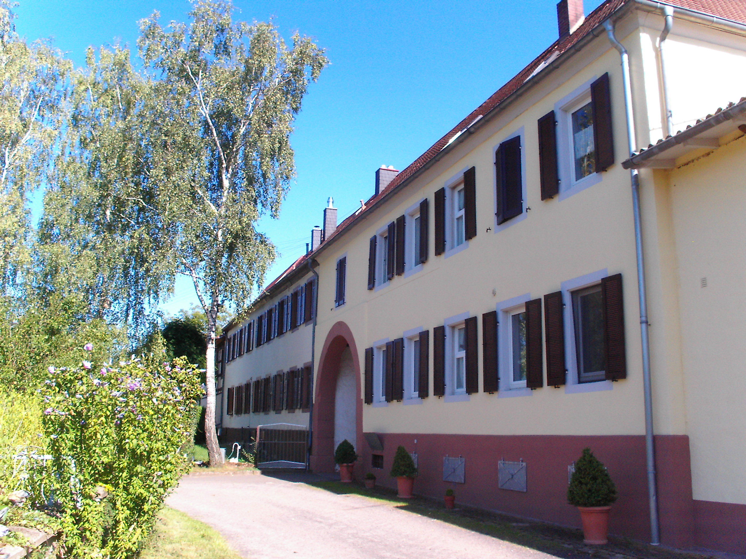 Münsterhof bei Dreisen, Rheinland-Pfalz, Gutshaus, Frontseite (ehem. Kloster Münsterdreisen)